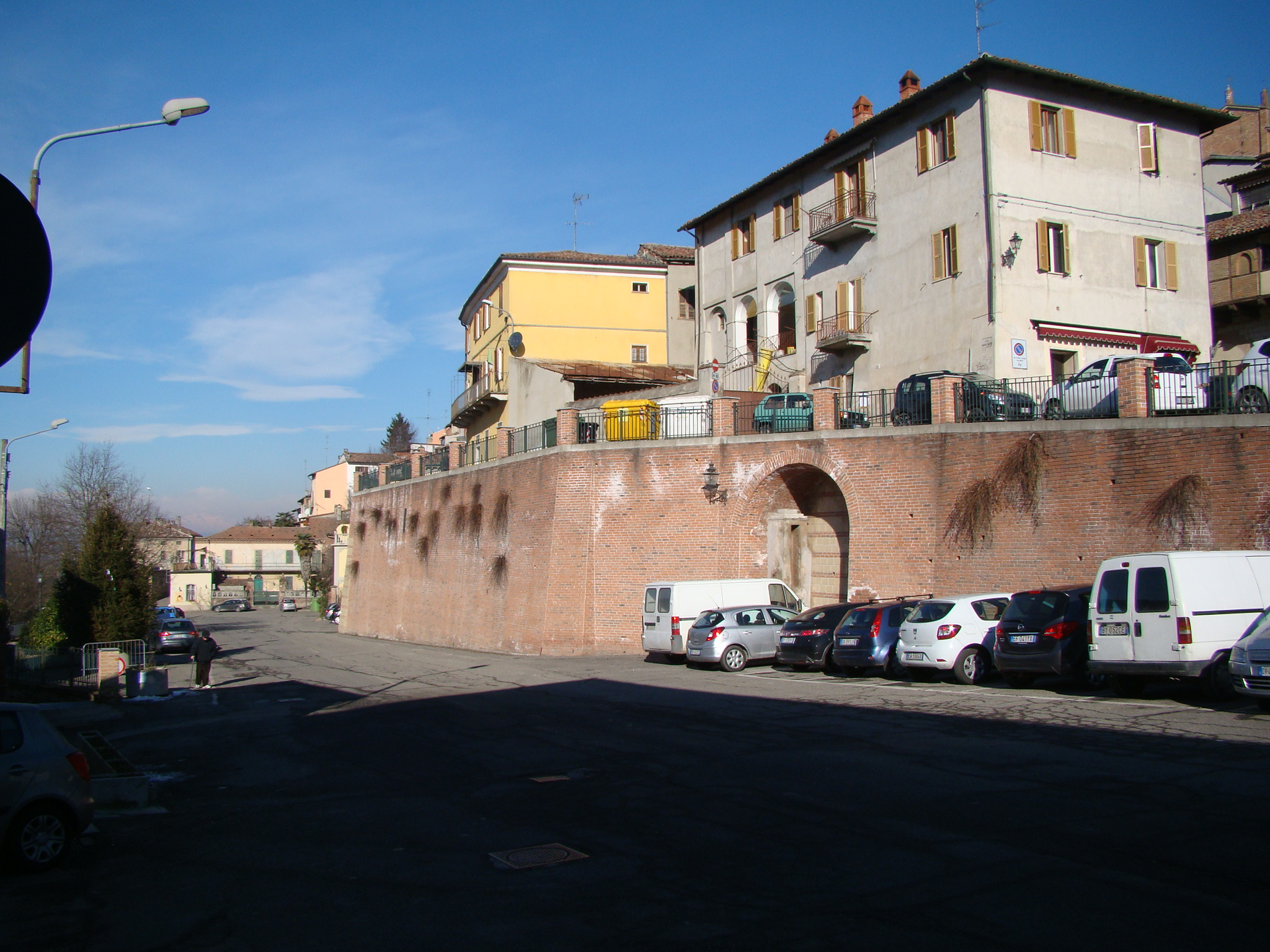 piazza Vittorio Veneto